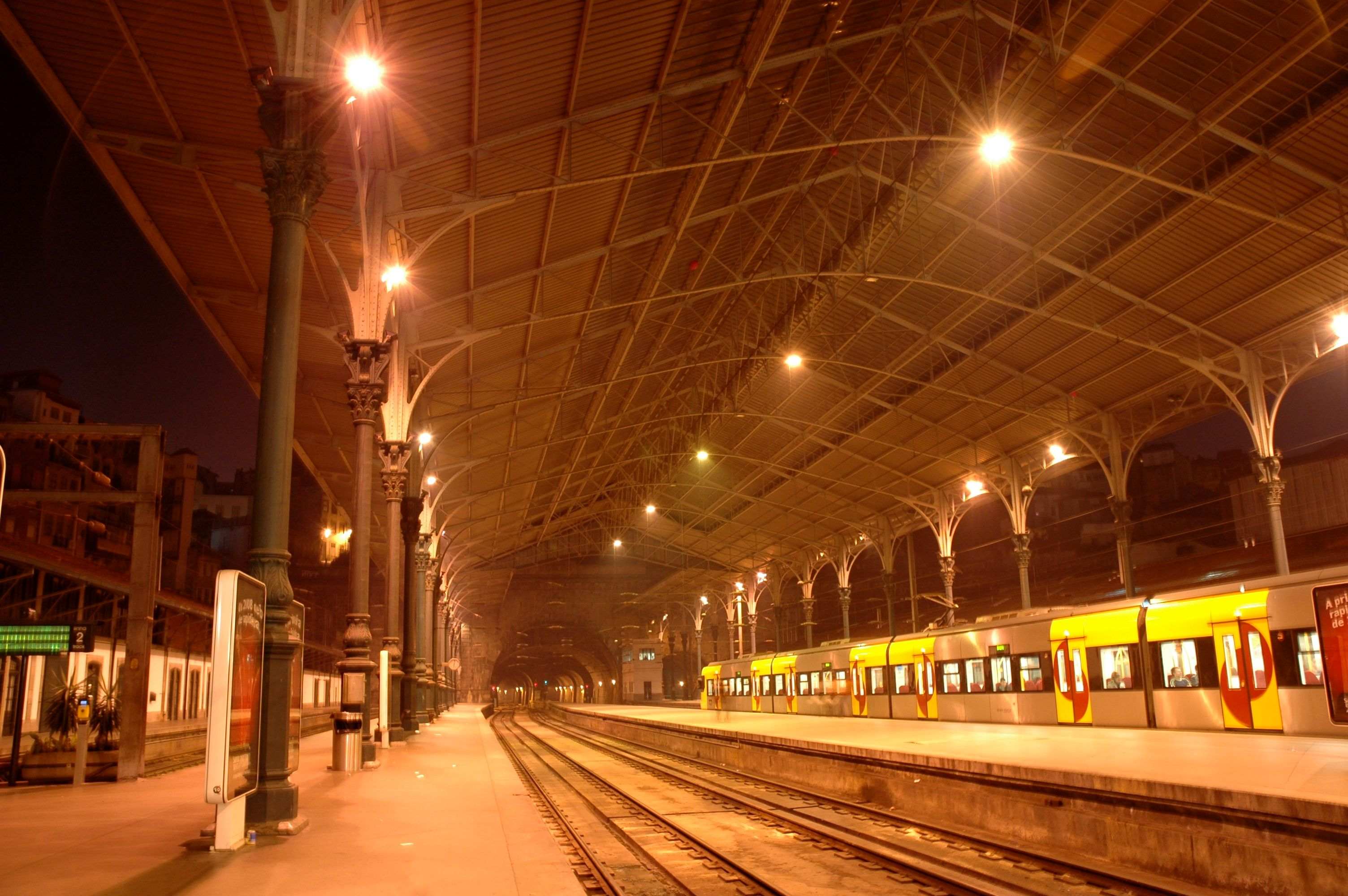 Porto - Estació de São Bento